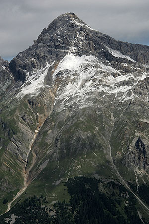 Teurihorn (ob Splügen)